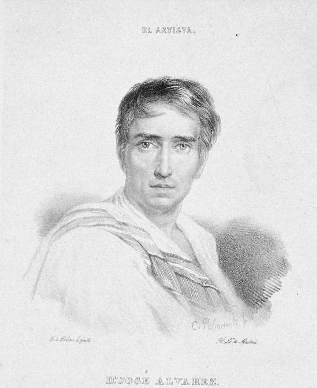 Retrato de José Álvarez Cubero. Litografía de Cayetano Palmaroli por dibujo de Juan Antonio de Ribera y Fernández. El artista.